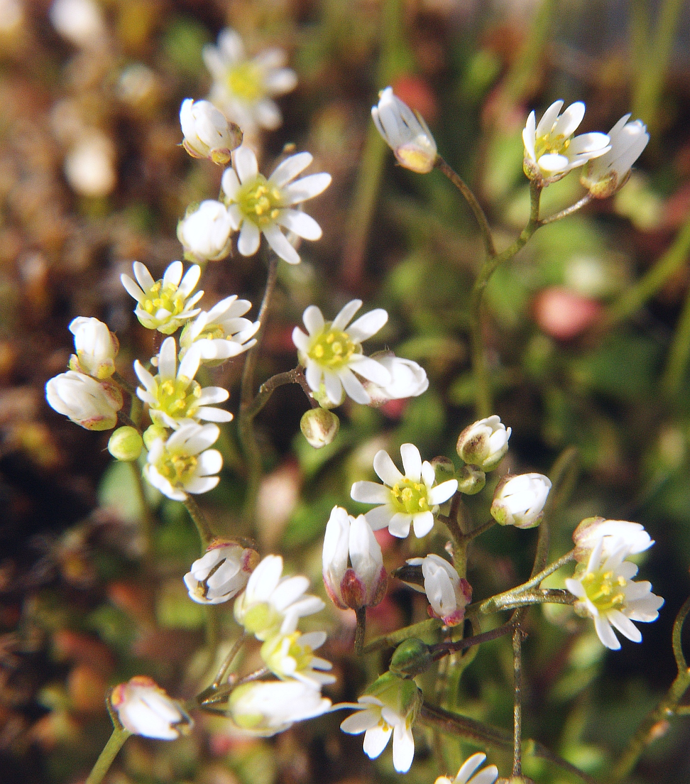 Erophila verna subsp. verna, Schwäbische Waldberge, Germany